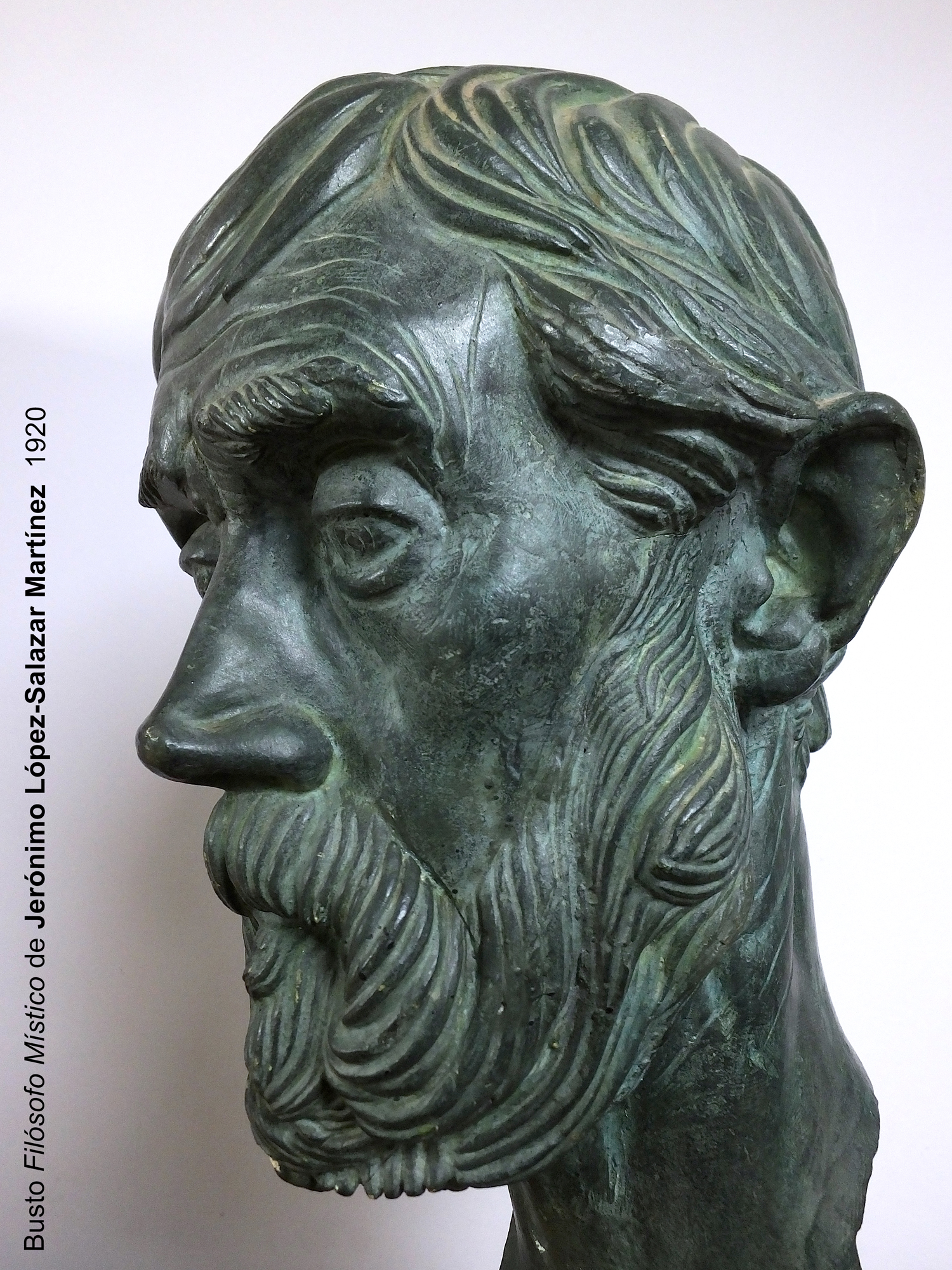 Busto del Filósofo Místico del escultor Jerónimo López-Salazar Martínez